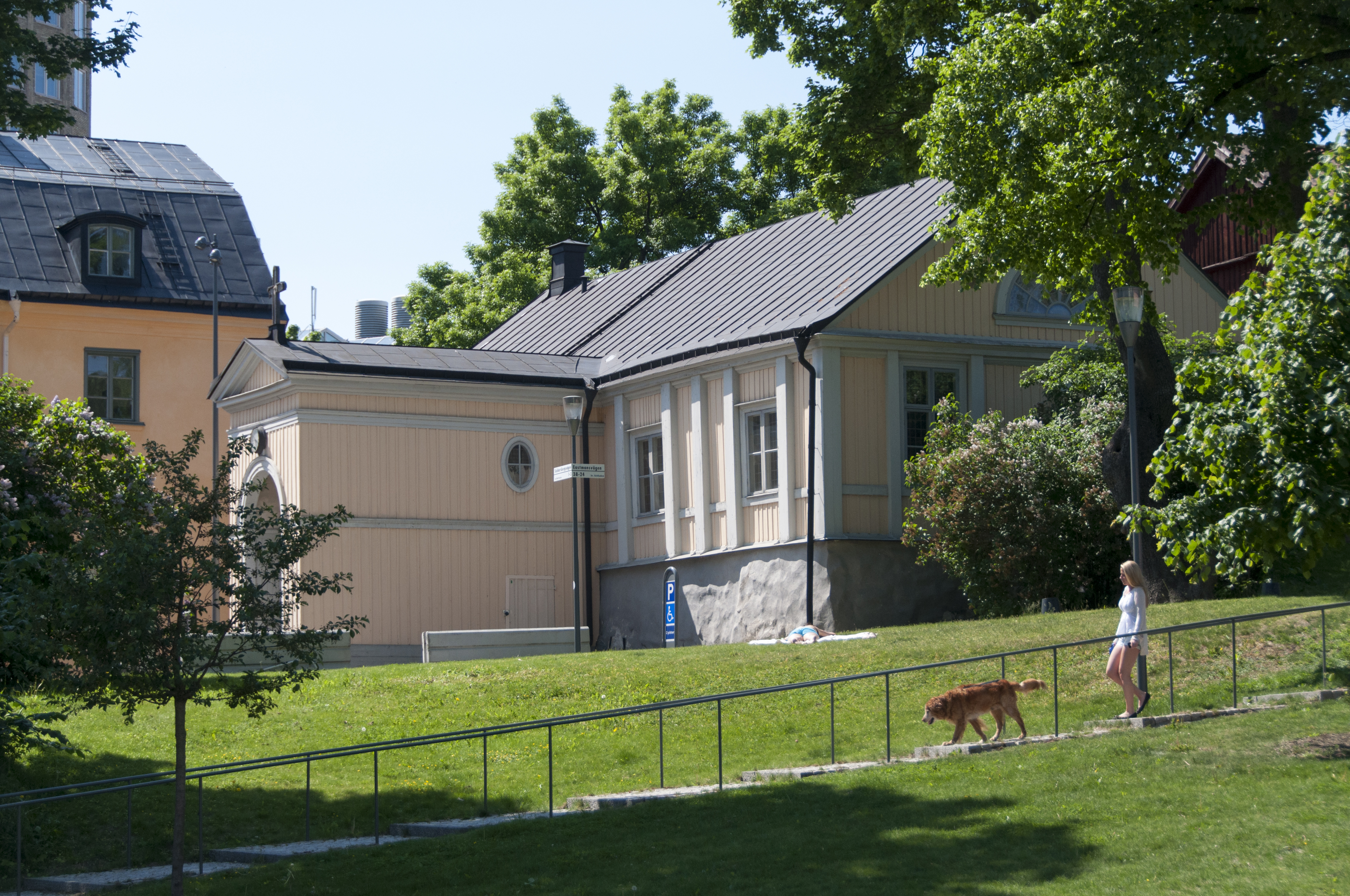 Sabbatsbergs kyrka, Nybyggnadsår 1700 - 1730, ursprungligen Valentin Sabbats Malmgård